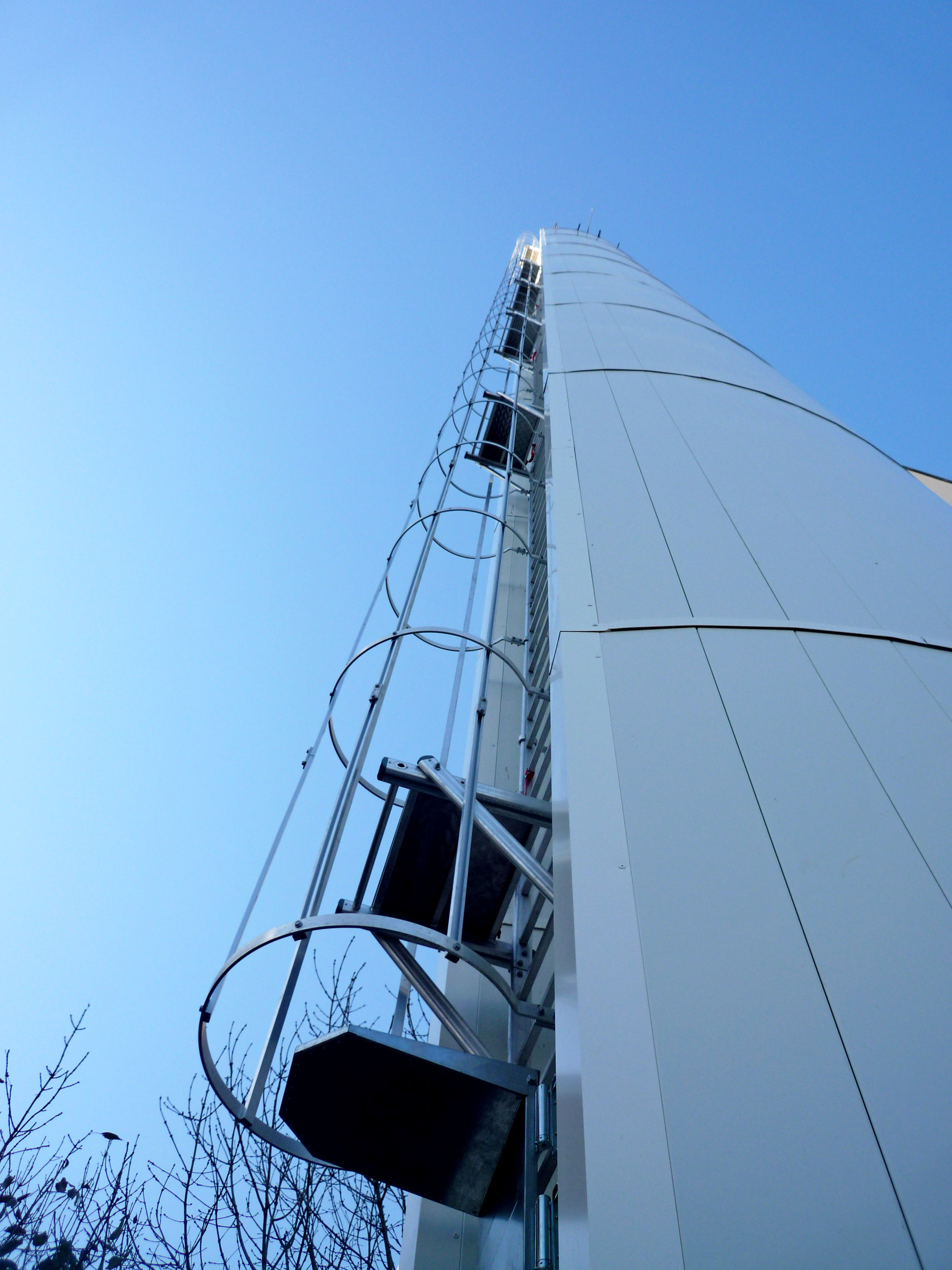 échelle à crinoline ACBI en aluminium sur tour à Paris